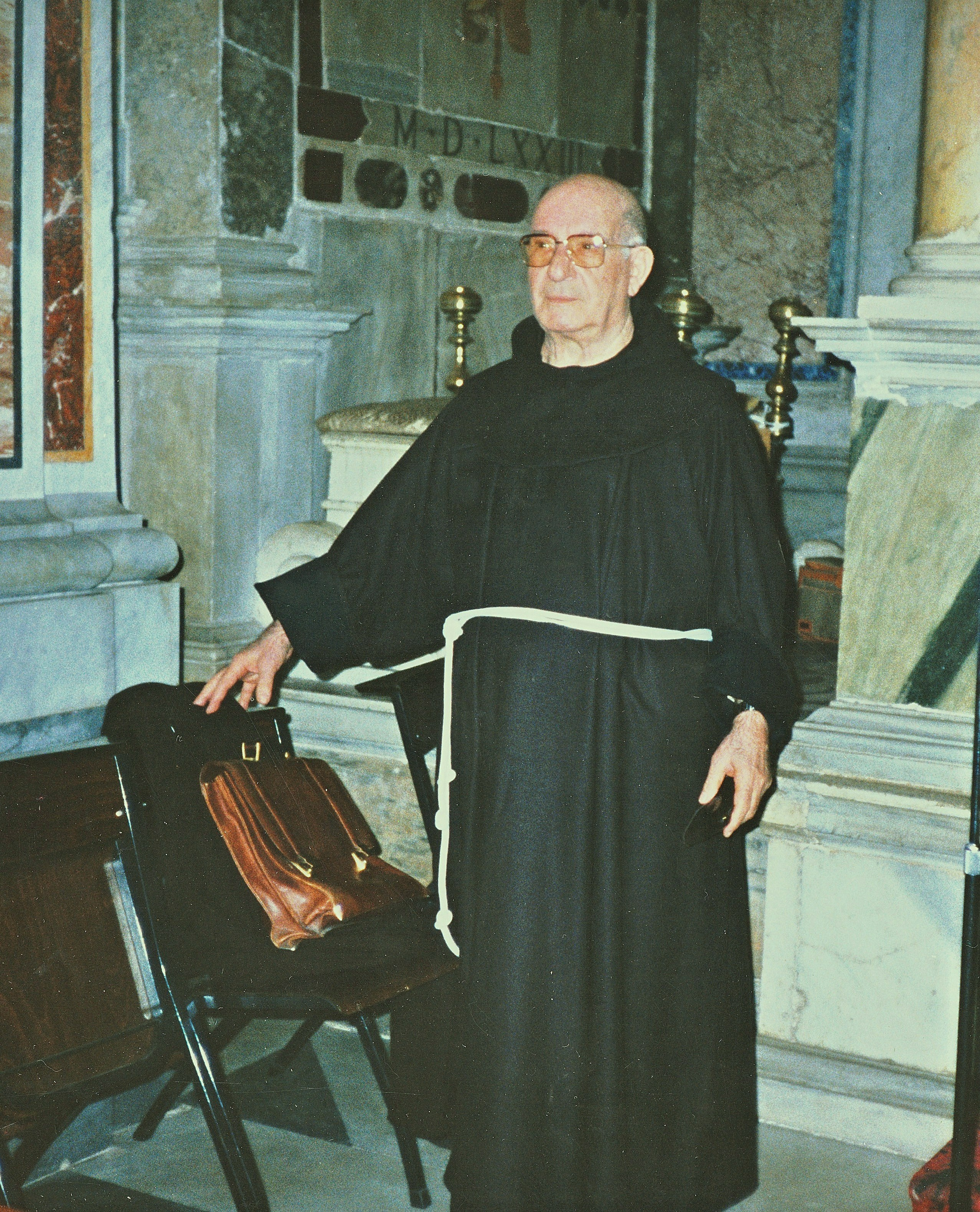 P. Enrico Buondonno, 1991